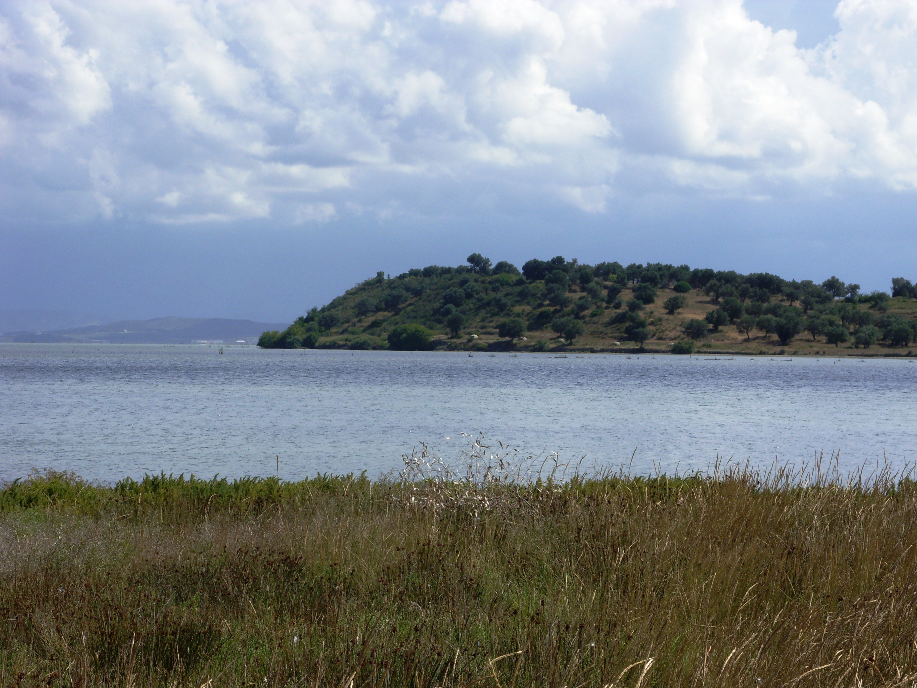 Lagune von Narta, nördlich von Vlora (Albanien)